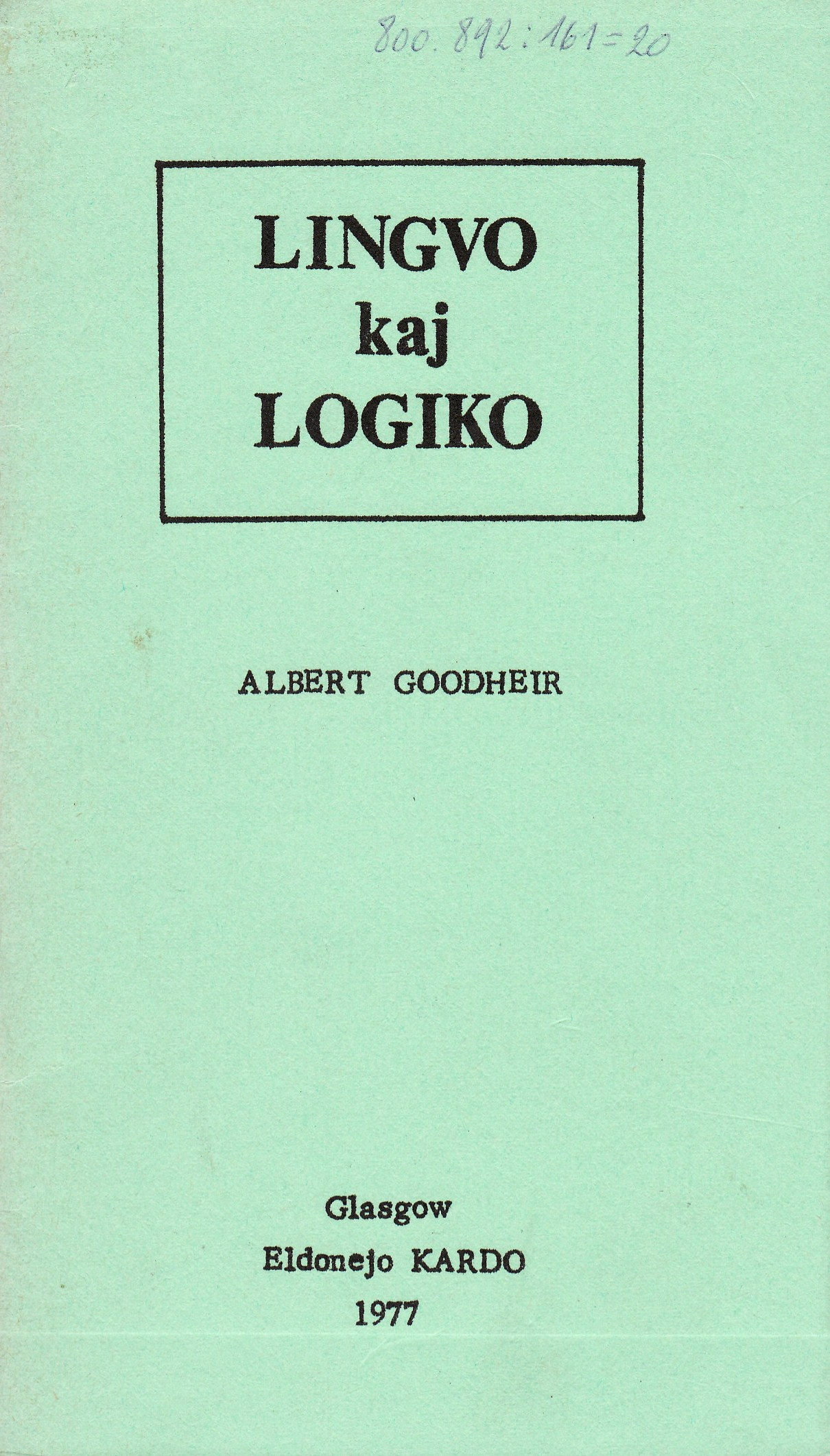 kovrilo de "Lingvo kaj Logiko", 1977